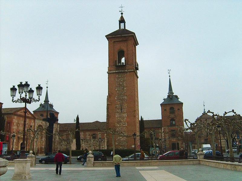 Capilla del Oidor en la plaza de Cervantes, Alcalá de Henares